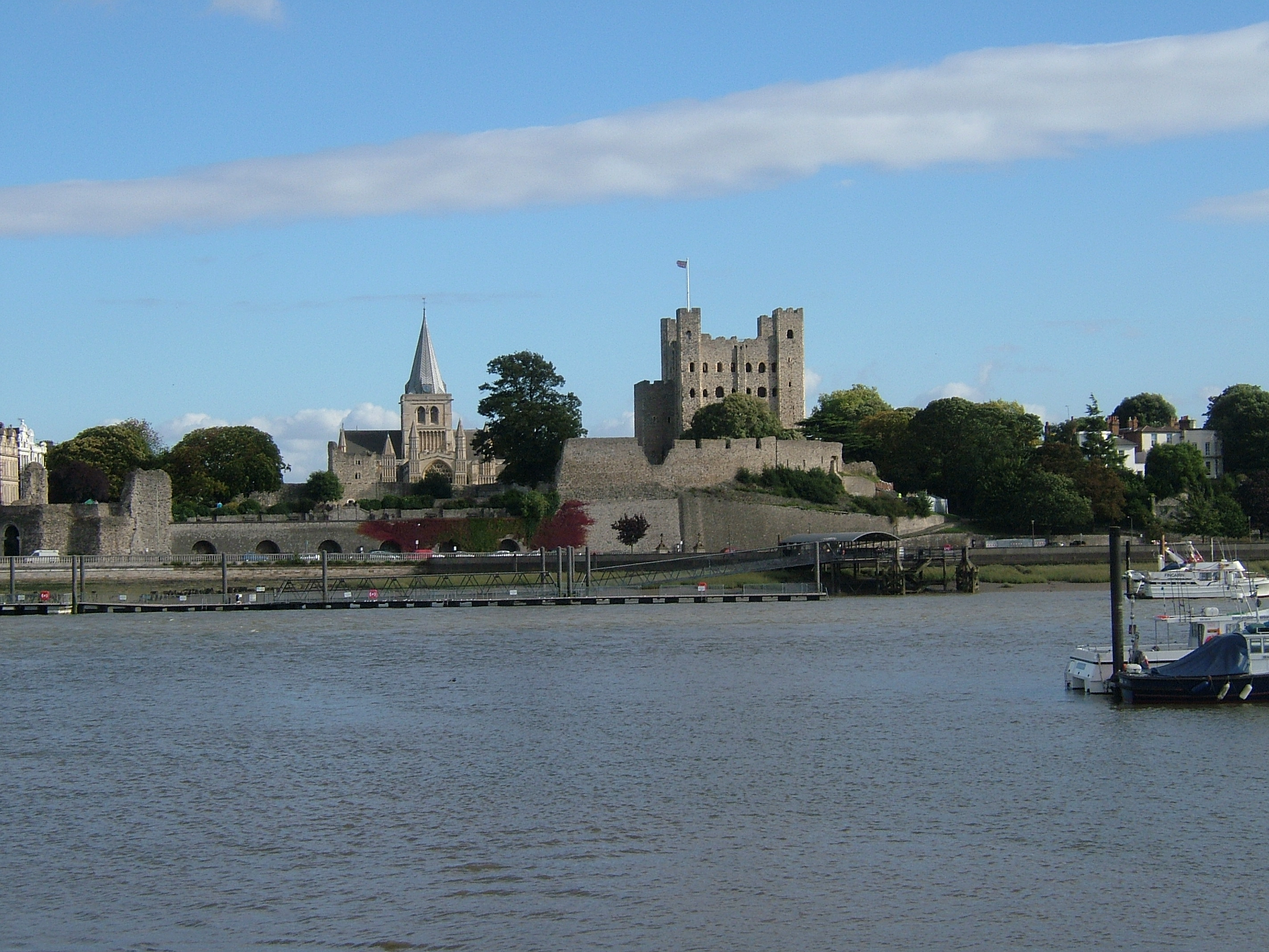 Rochester